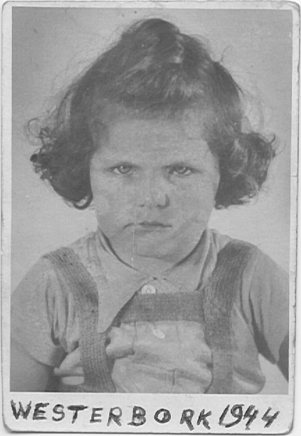 Foto uit privécollectie Lous Steenhuis-Hoepelman